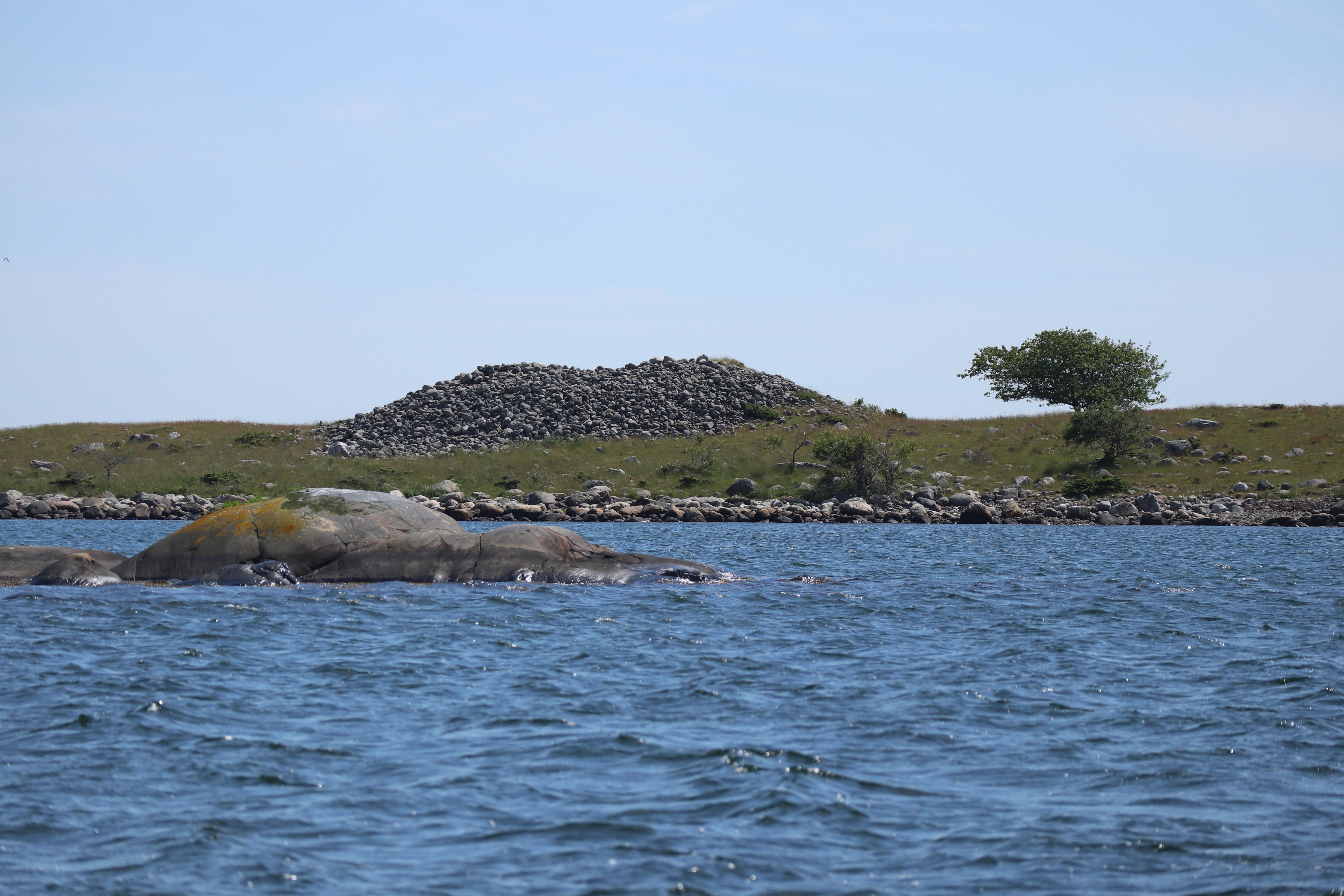 Gravrøys østligst på Jerkholmen. Sjøen i forgrunnen.